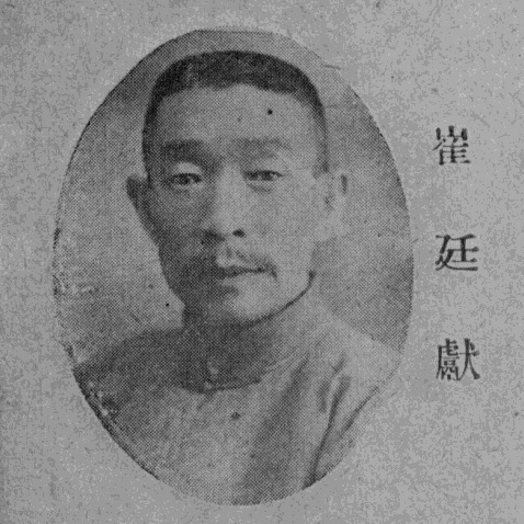 中文（台灣）: 《民國名人圖鑑》肖像